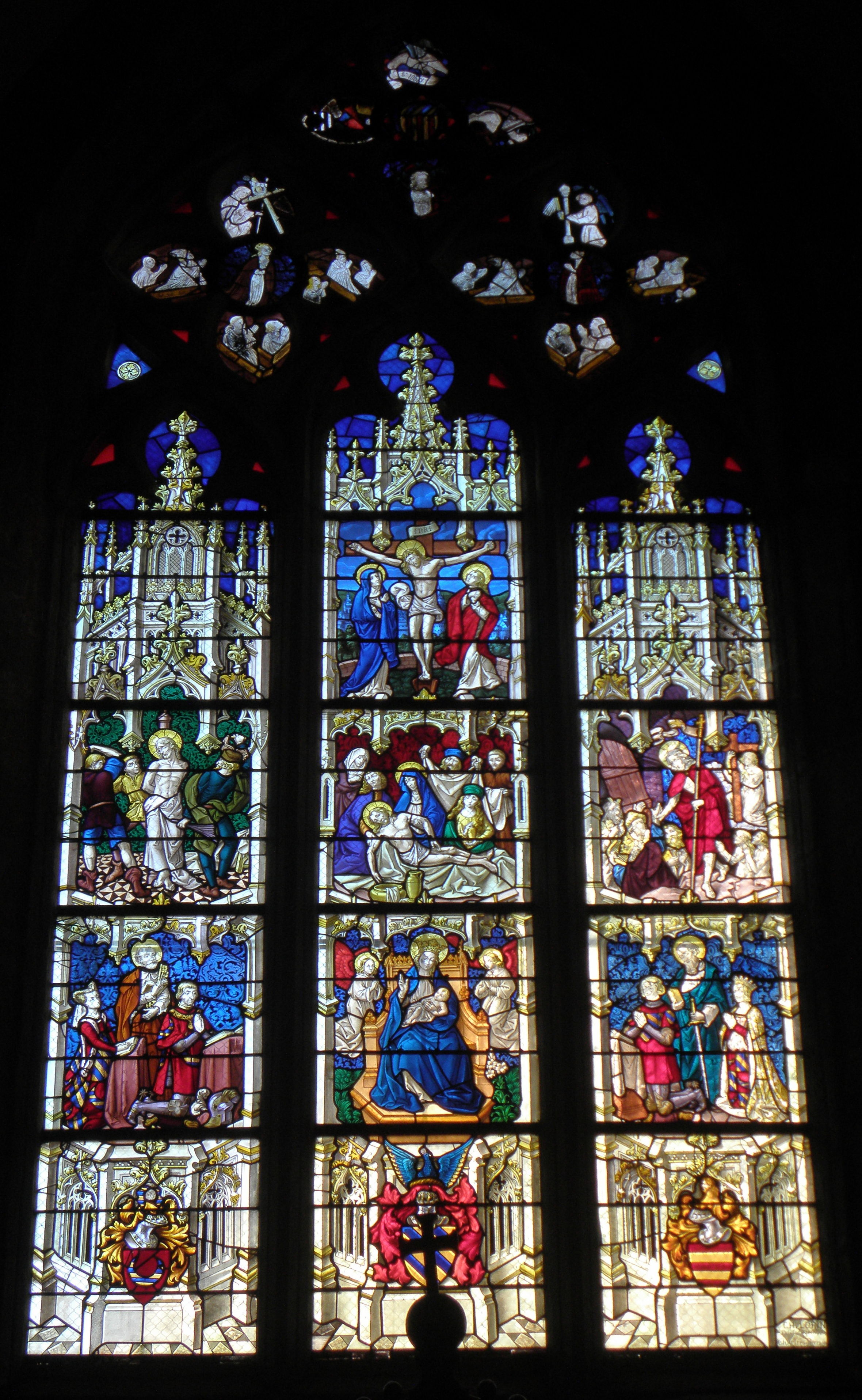 Intérieur de l'église Saint-Pierre de Saint-Père-Marc-en-Poulet (35). Baie n°10. Vitrail de la Résurrection et du Jugement Dernier.